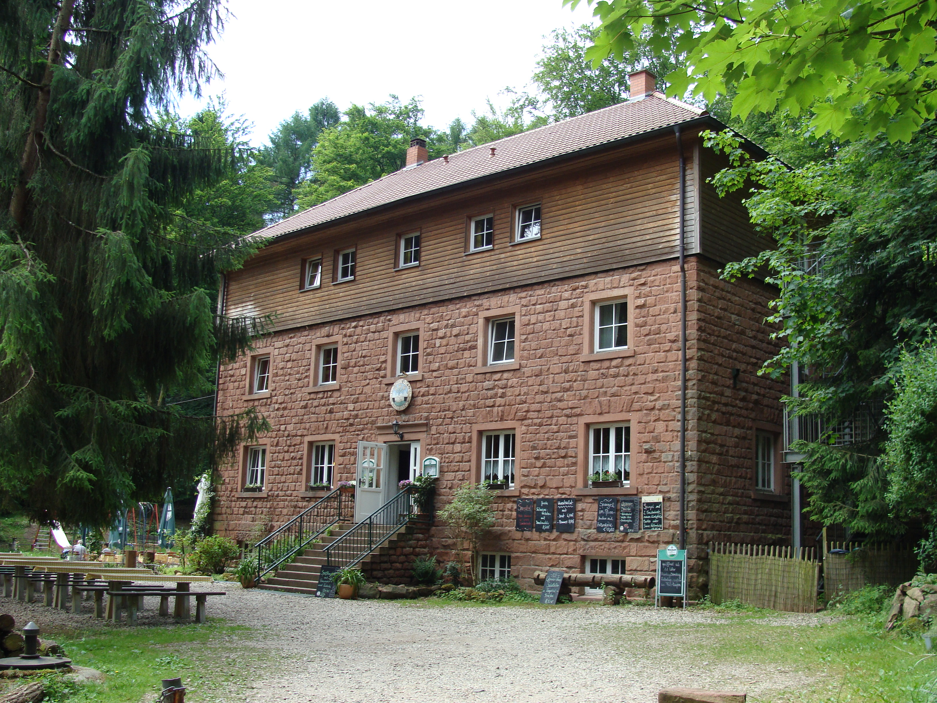 Naturfreundehaus Oppauer Haus im Pfälzerwald